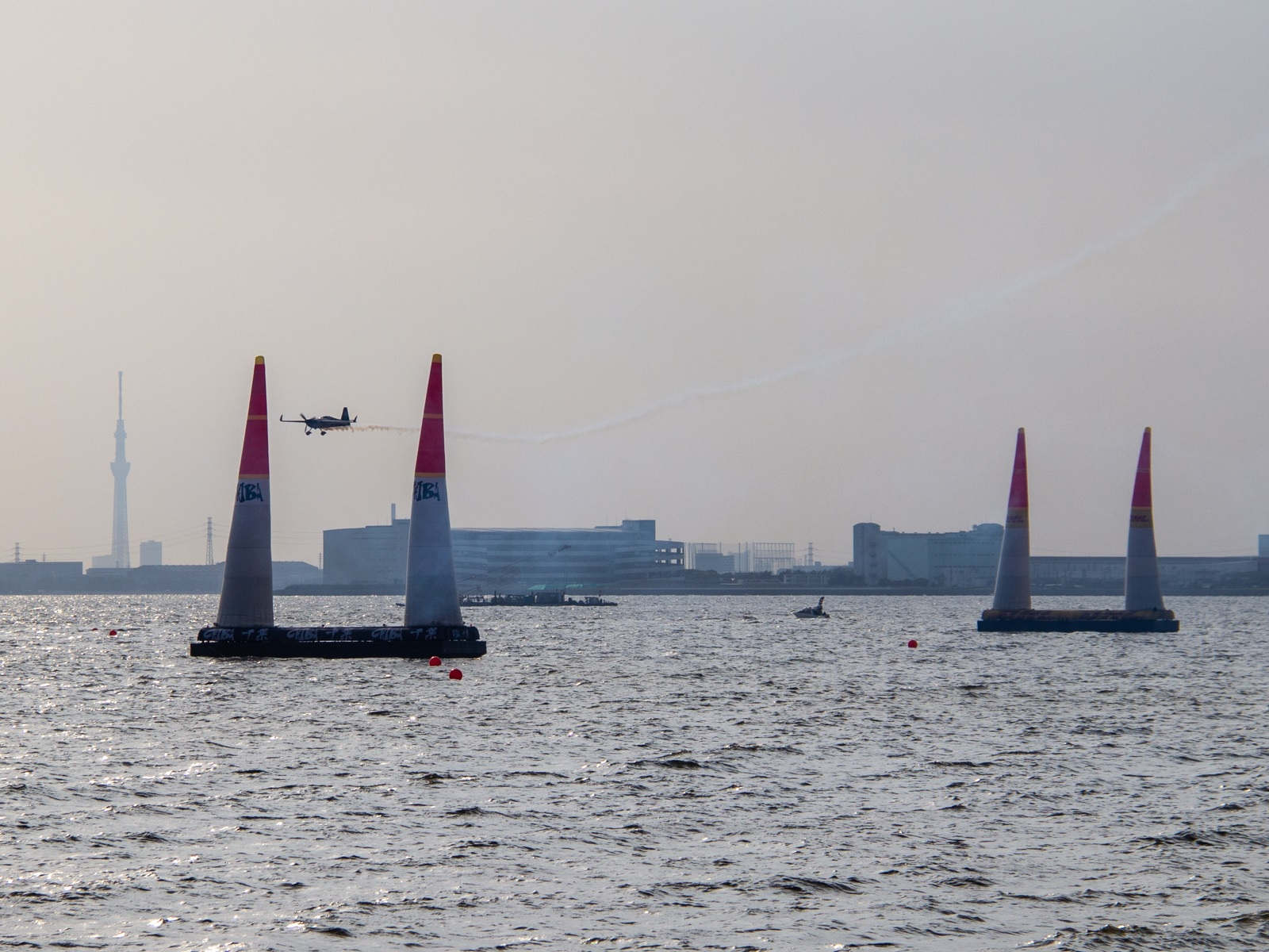 2018年レッドブル・エアレース・ワールドシリーズ 千葉 マットホール Final4